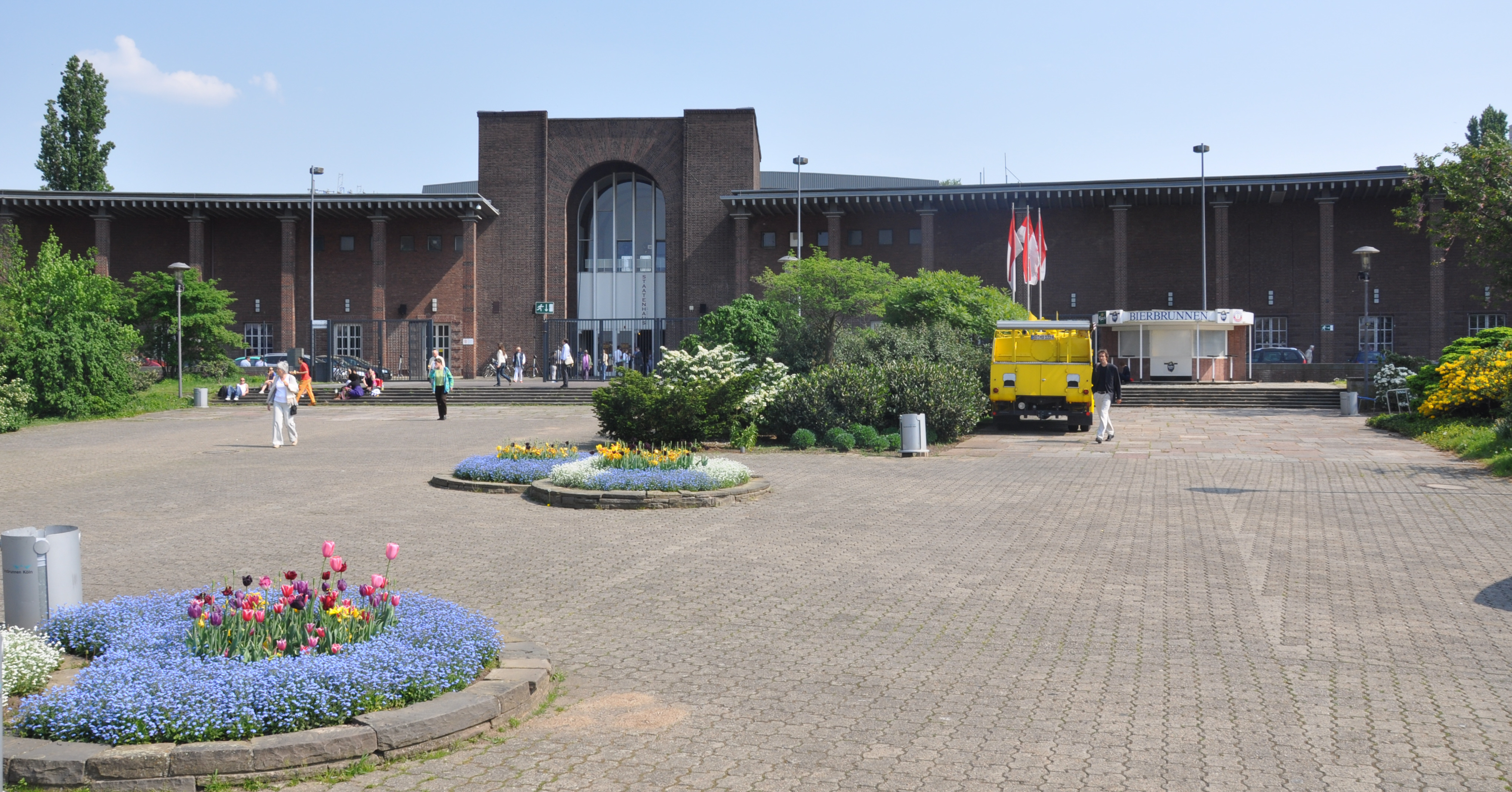 Köln, Staatenhaus